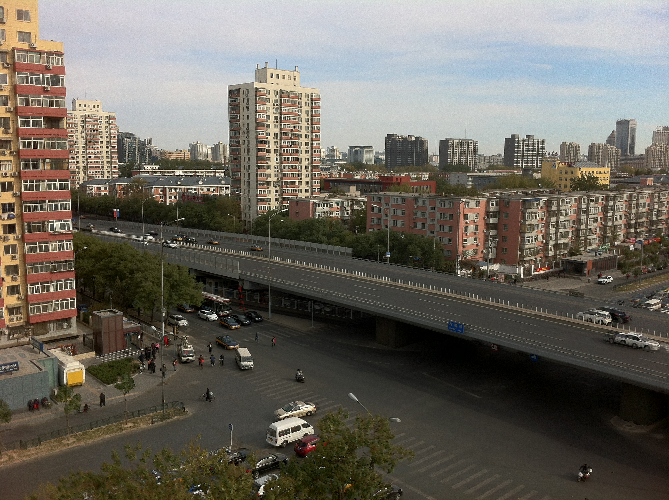 北京花园桥，拍摄自首都师范大学实验楼